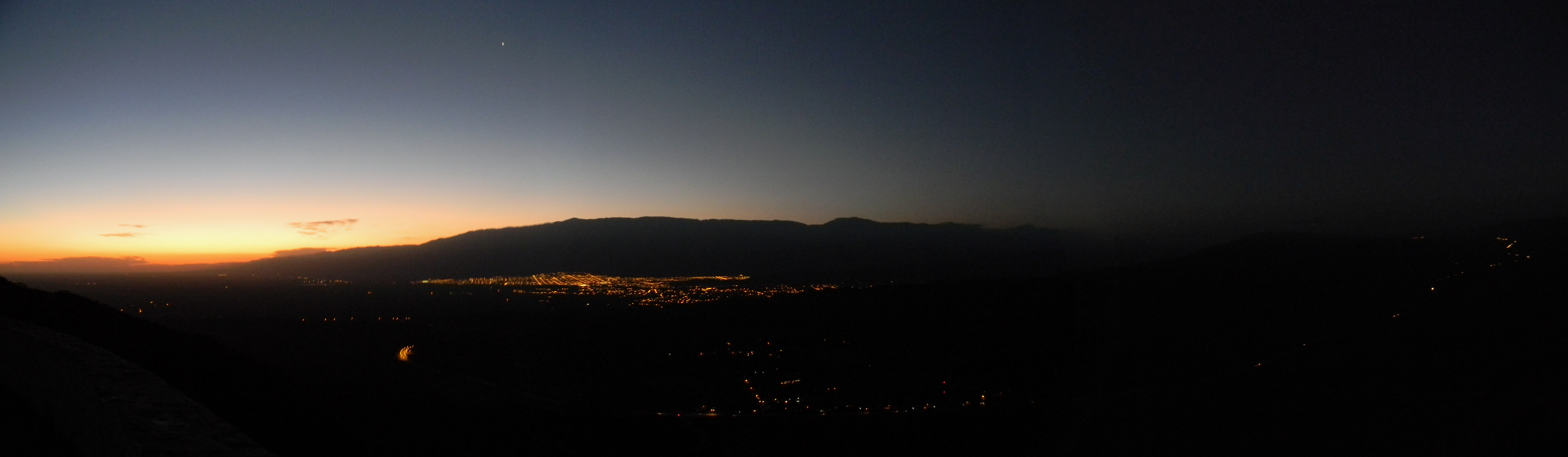 Vista nocturna de la Ciudad de San Fernando del Valle de Catamarca.